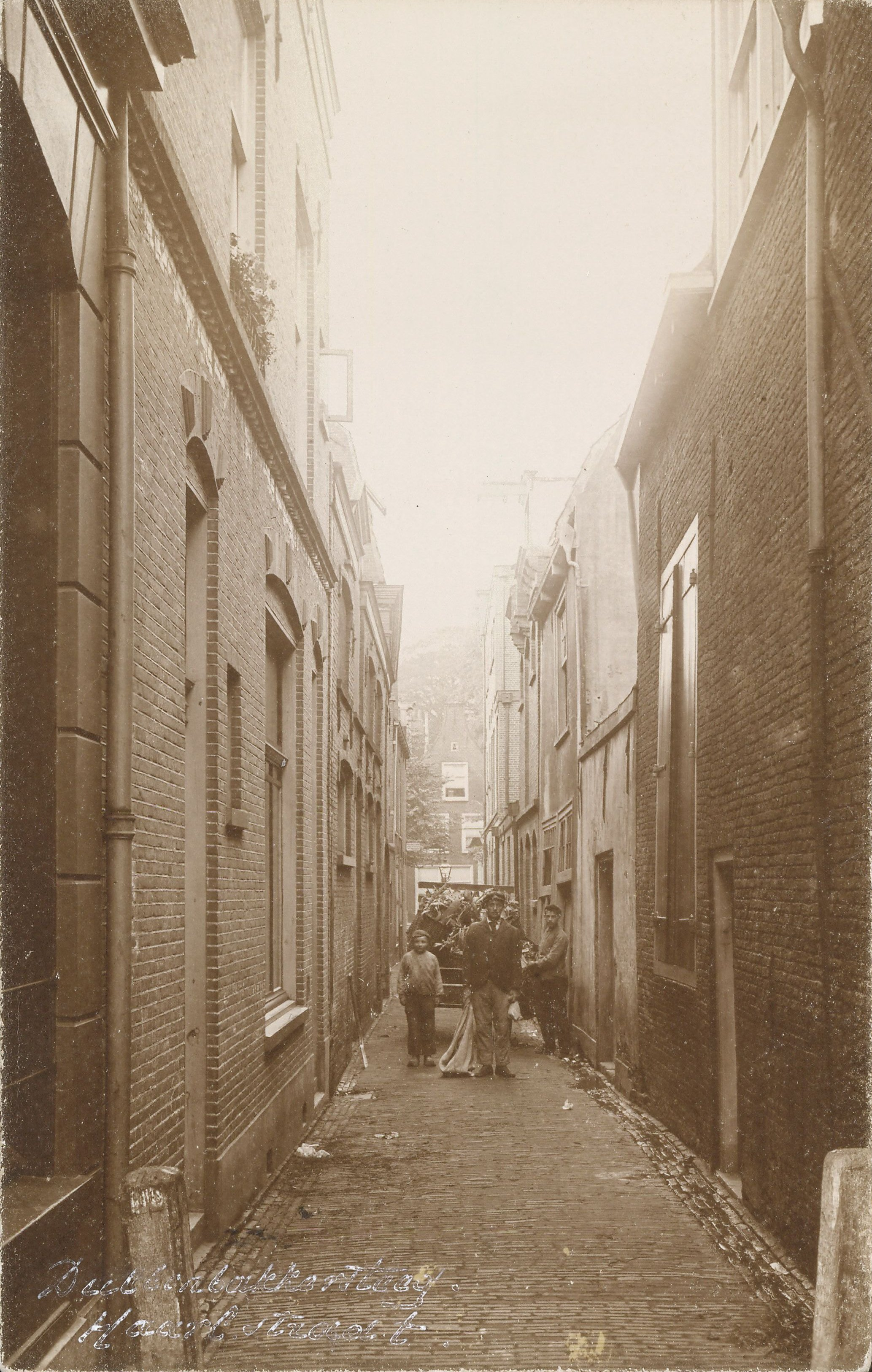 Dulle Bakkersteeg gezien van de Haarlemmerstraat naar de Oude Rijn.